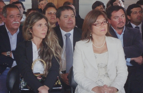 La gobernadora de Cardenal Caro, Teresa Núñez (a la derecha) junto a la ex concejal de Pichilemu, Viviana Parraguez.